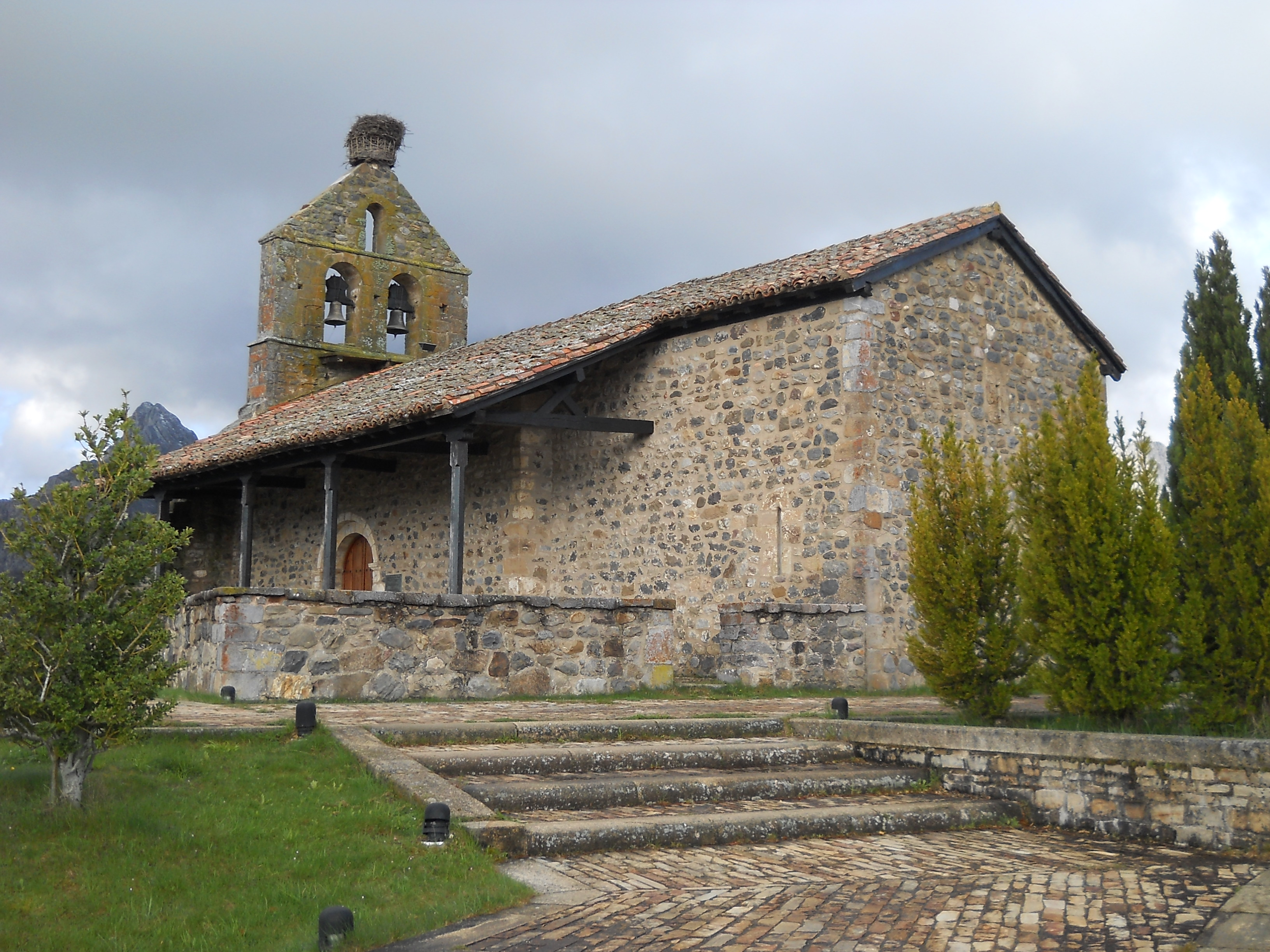 Eremo di Nostra Signora del Rosario, Riaño, León, Spagna